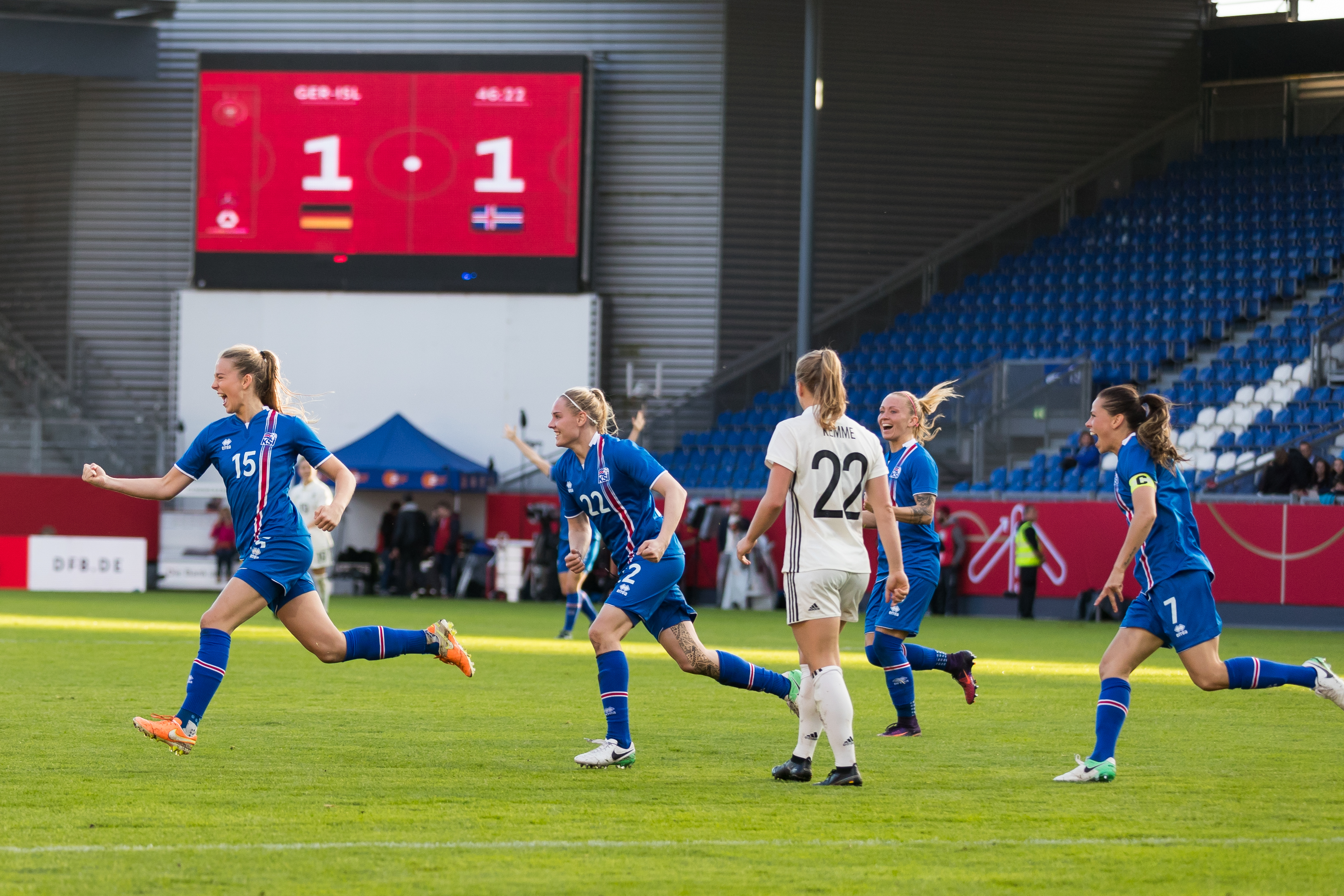 during Fussball Frauen Deutschland vs Island at Brita-Arena, Wiesbaden, Hessen, Germany on 2017-10-20, Photo: Sven Mandel